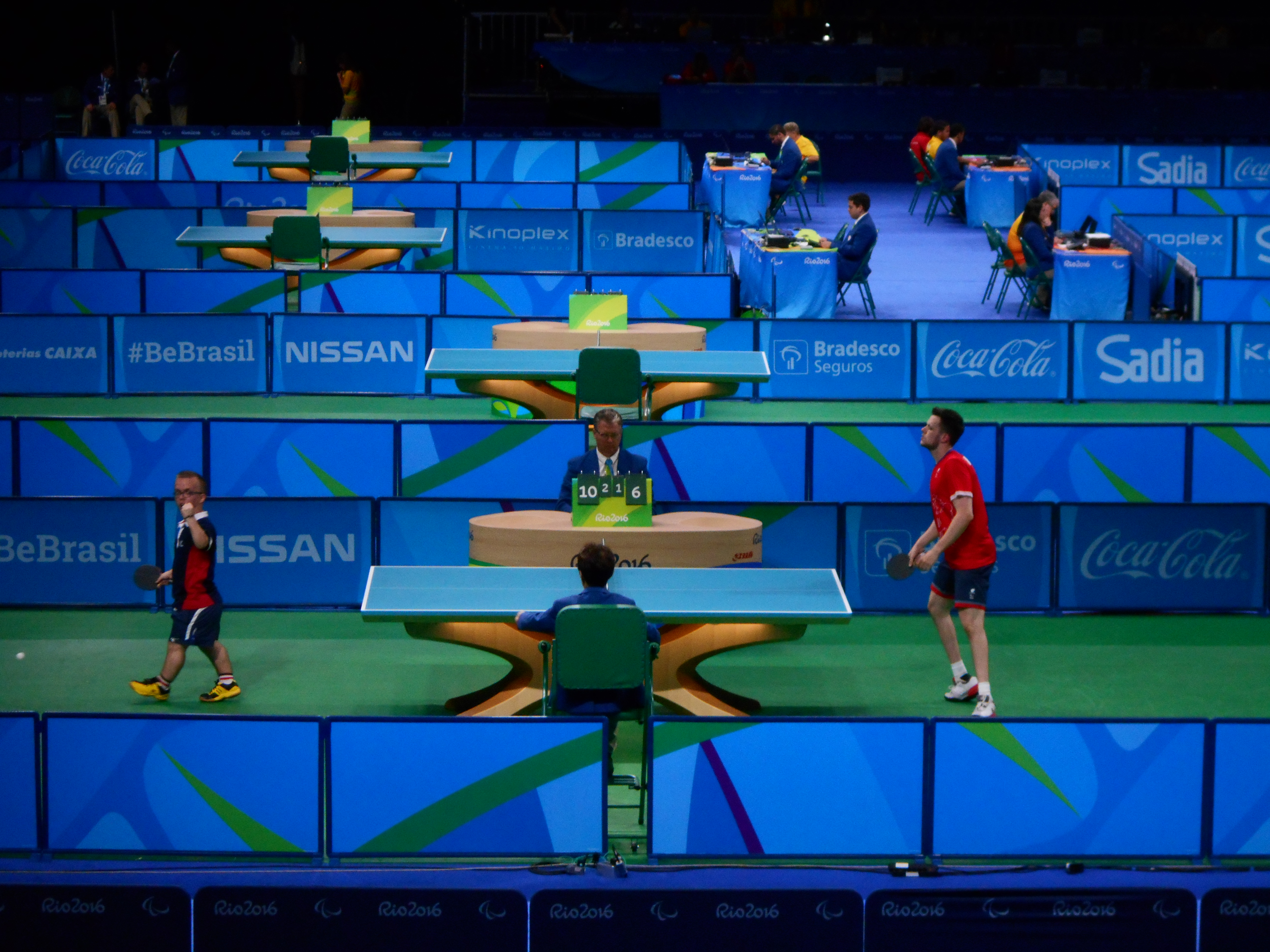 Primeiro dia de competições da modalidade tênis de mesa nos Jogos Paraolímpicos Rio 2016.